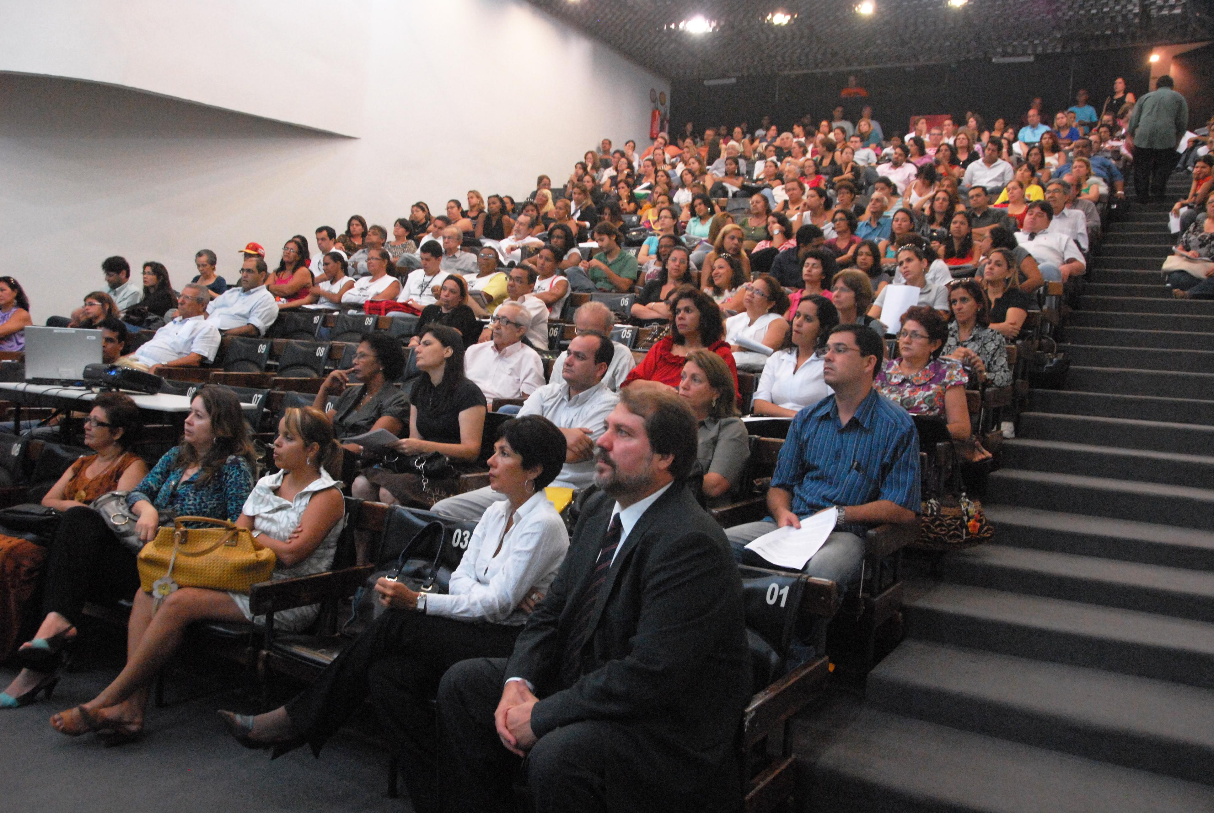 Capacitação sobre Conjuntivite e Gripe A promovida pela Prefeitura de Olinda - Olinda - Pernambuco - Brasil.